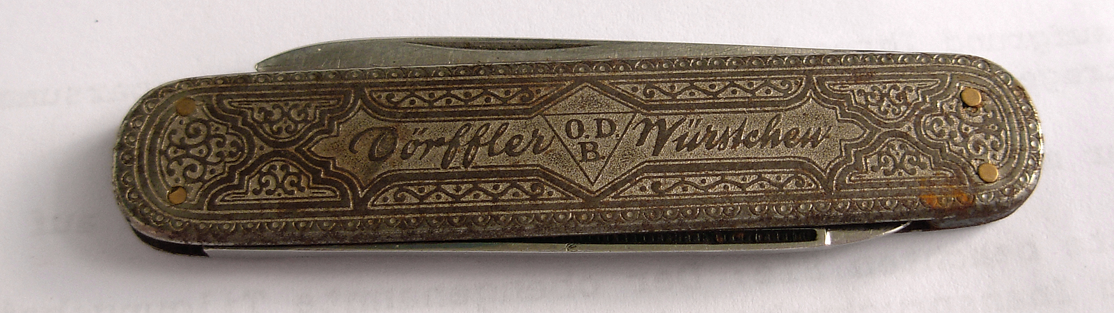 Taschenmesser der 1902 in Berlin gegründeten Firma von Oscar Dörffler (O.D.B.), die am 24. November 1920 in eine Aktiengesellschaft mit Sitz in Bünde umgewandelt worden war